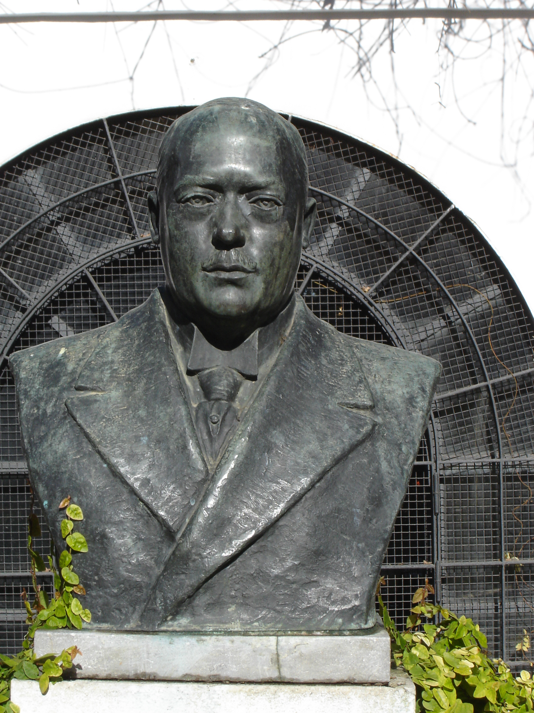 Glorieta de Luca de Tena, en el Parque de María Luisa (Sevilla). Busto del homenajeado. Realización propia.